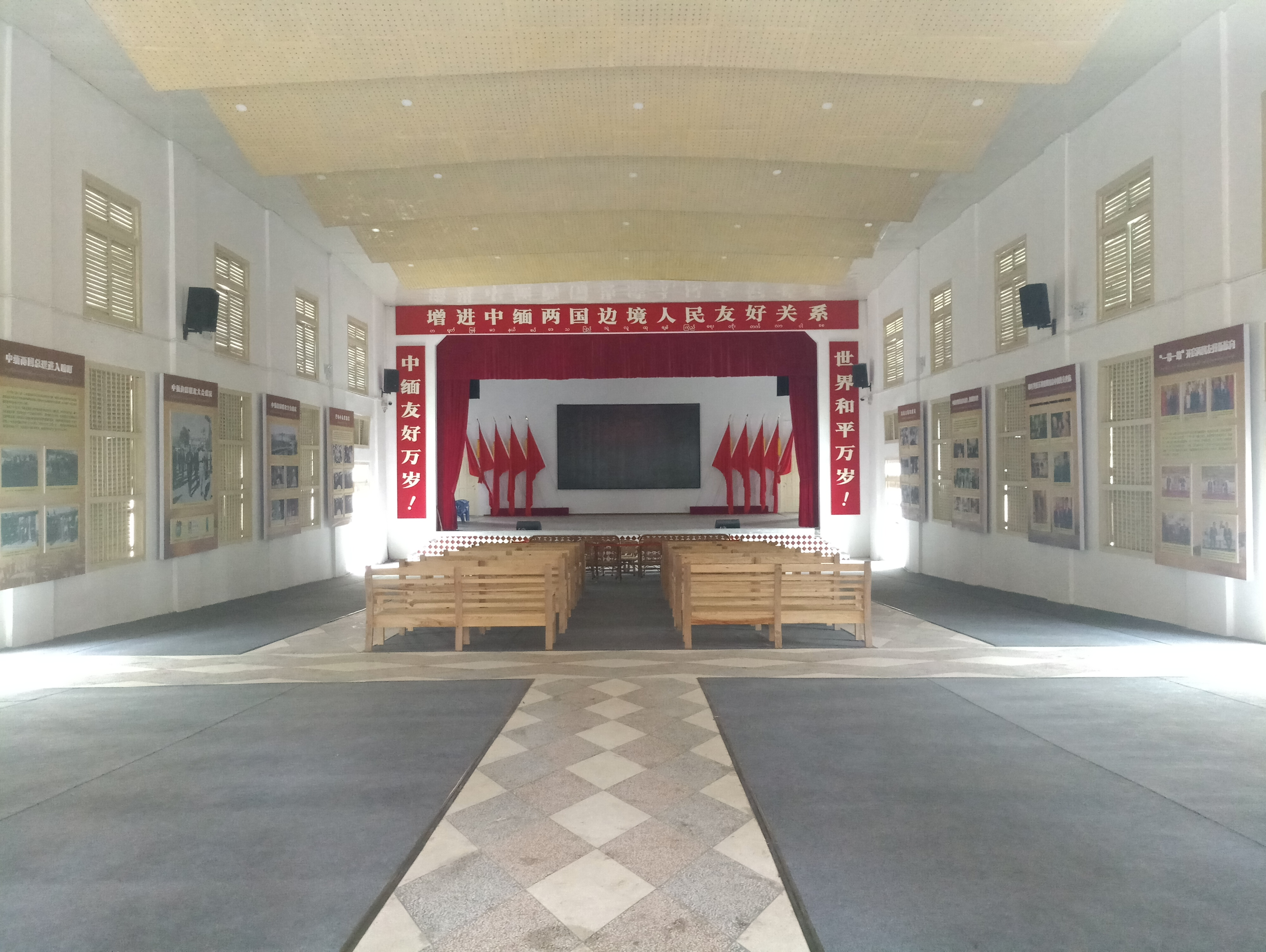 中文（中国大陆）: 芒市小礼堂-内部